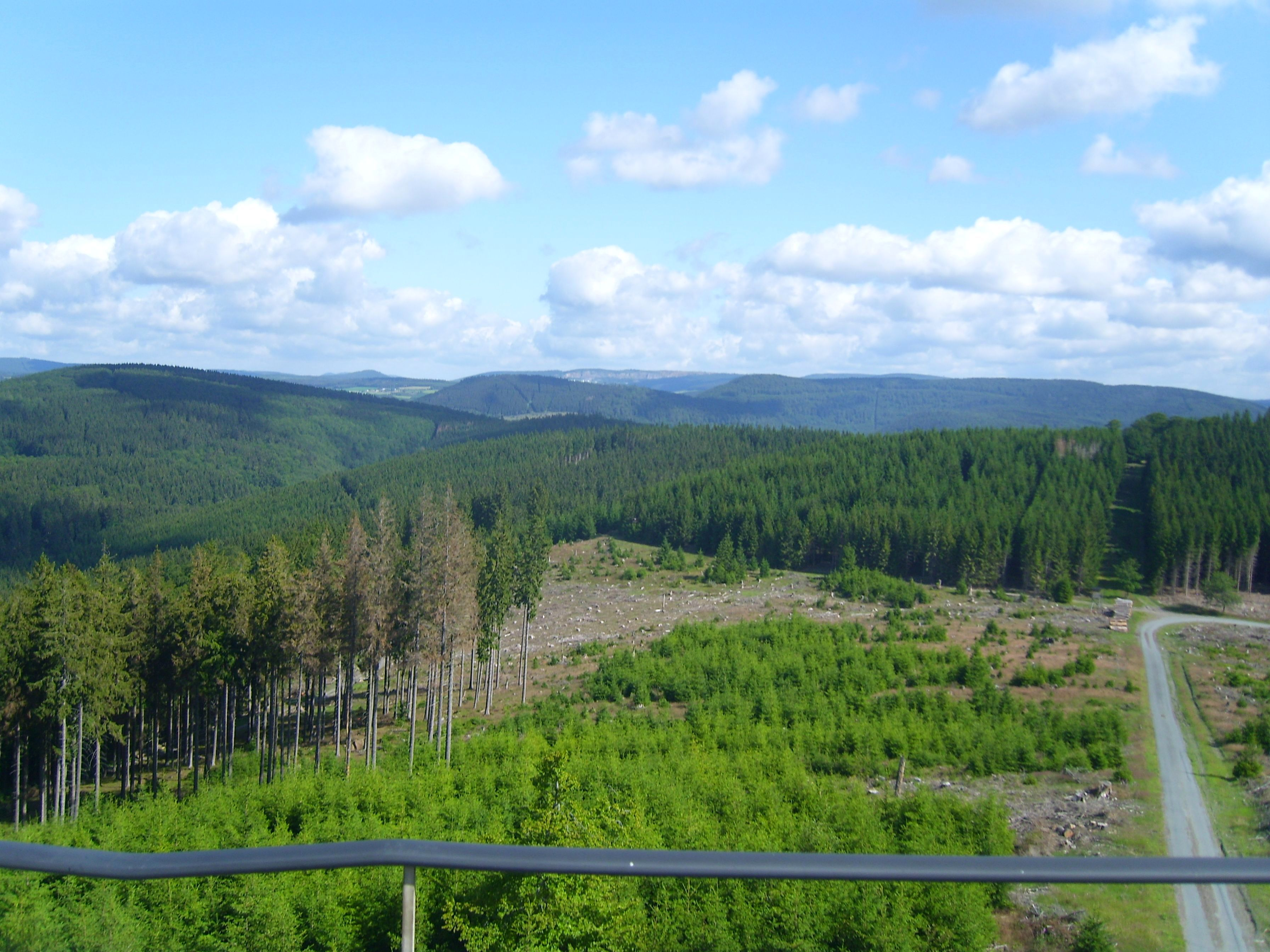 Blick vom Bollerbergturm (758 m) auf andere Berge der Hohe Seite (Naturraum 333.7) und, im Hintergrund, Berge aus anderen Naturräumen des Rothaargebirges (333): Nordhelle (793 ; 11,2 km; 333.57 Nordheller Höhen) Hohe Seite (752,5 m; 2,4 km) Rimberg (765 m; 11,0 km; Nordheller Höhen), links davon Wiedegge (732 m; 21,0 km; 333.81 Ramsbecker Rücken und Schluchten) Wiedegge-Westgipfel Ohlenkopf (729 m; 21,3 km) Alte Grimme (755 m; 4,9 km) Clemensberg (839 m; 11,1 km; 333.58 Langenberg) dahinter der Langenberg (843,1 m; 13,5 km), von dem man jedoch fast nichts sieht Rösberg (786 m; 5,2 km), Reetsberg-Westgipfel, rechts davon herauslugend: Hegekopf (842,9 m; 12,4 km; Langenberg) Hopperkopf (831 m; 9,8 km; Langenberg) Reetsberg (792 m; 5,3 km) – siehe Udeuschle